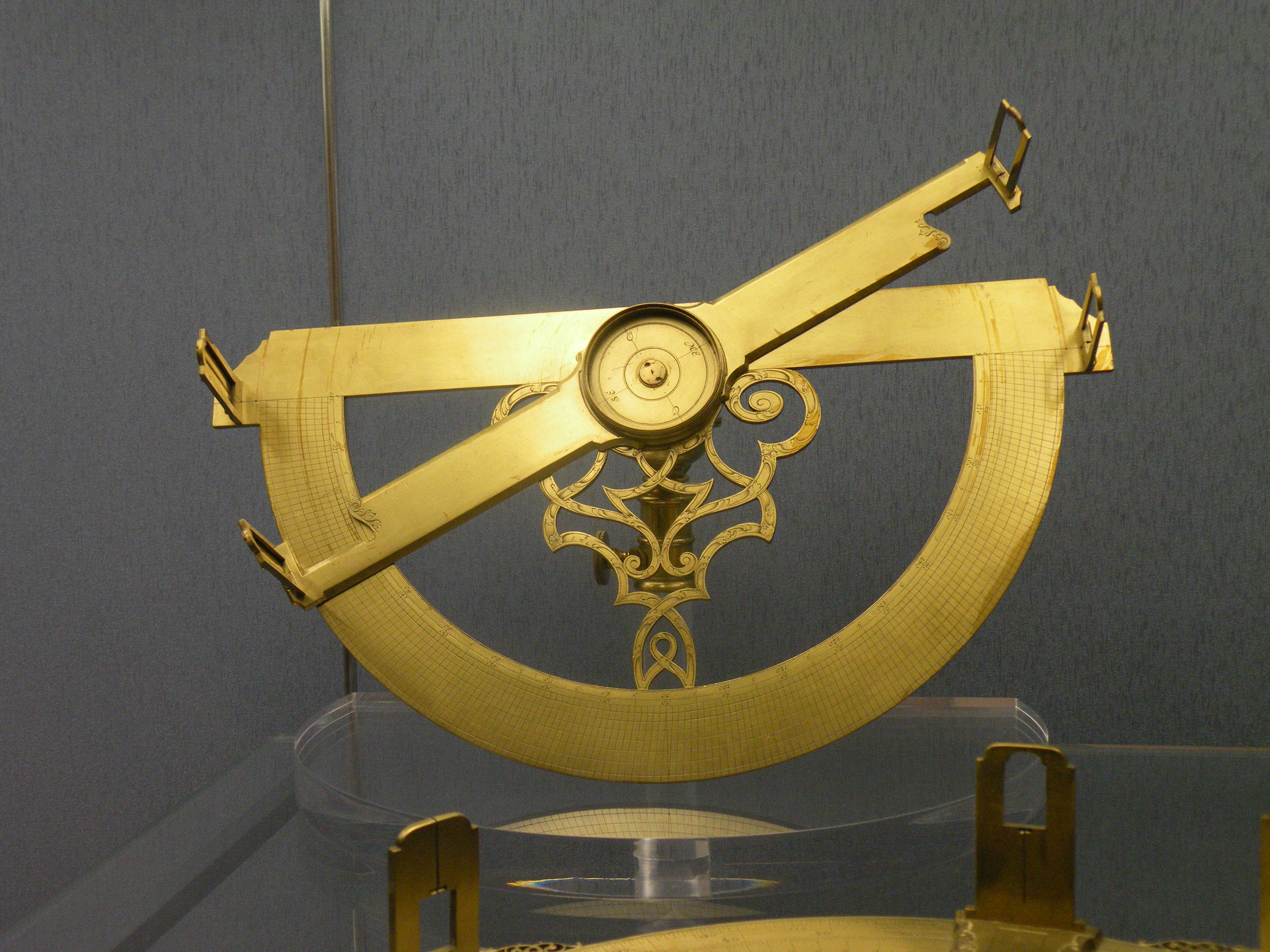 Угломерный инструмент. Немецкий национальный музей. Нюрнберг